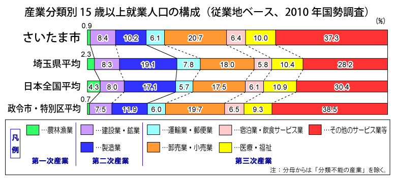 産業分類別従業者人口に関する、さいたま市と埼玉県、日本全国、政令市・特別区部平均との比較。